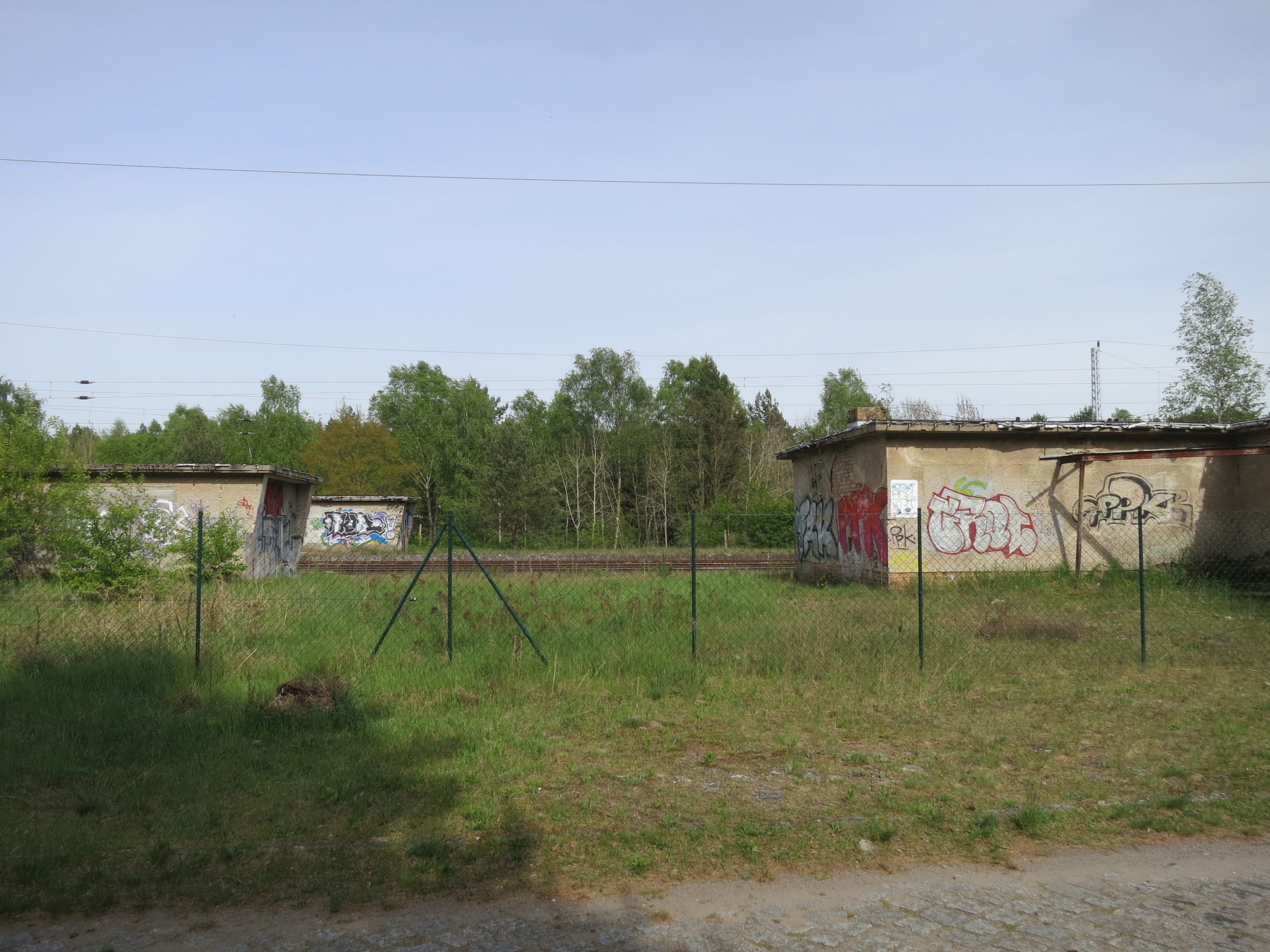 Früherer Bahnhof Fichtengrund, Empfangsgebäude (rechts) und Treppenzugänge in den Tunnel